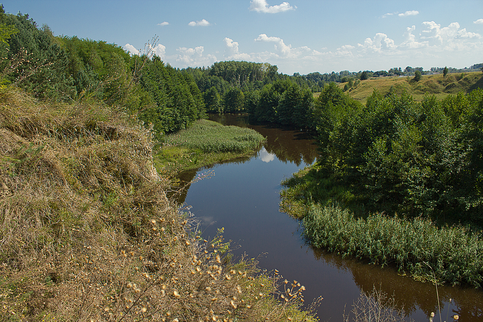 Поблизу с. Довгиничі протікає ріка Норинь з гарними краєвидами на її берегах.